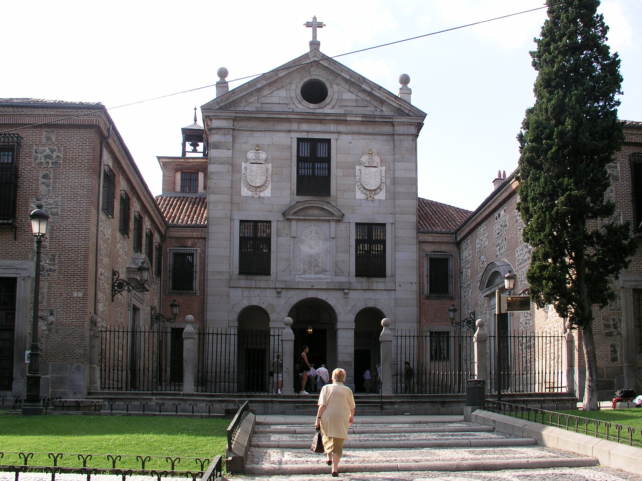 Real Monasterio de la Encarnación, Madrid, Spain